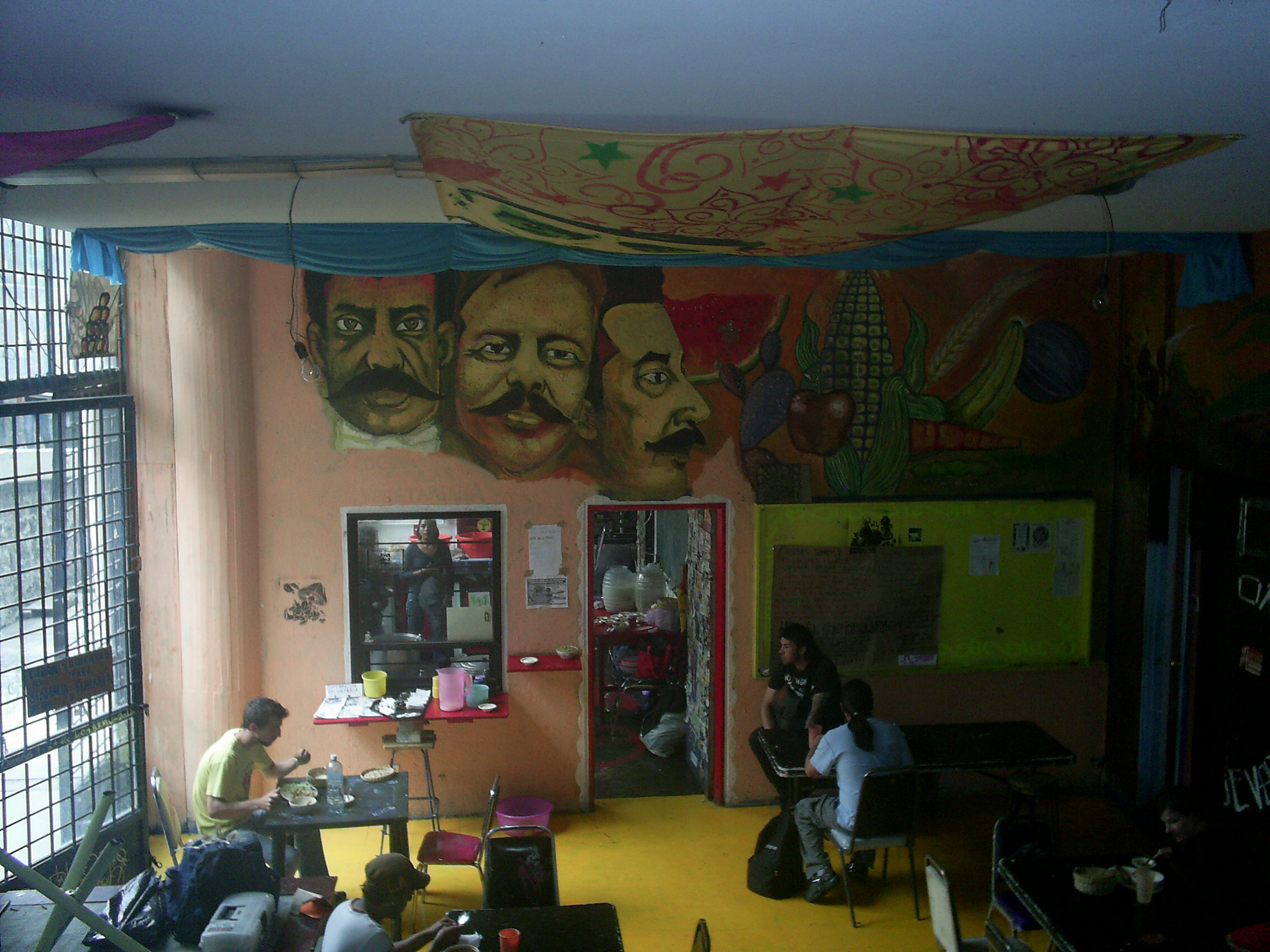 Comedor vegetariano del Auditorio Ernesto "Che" Guevara de la UNAM.